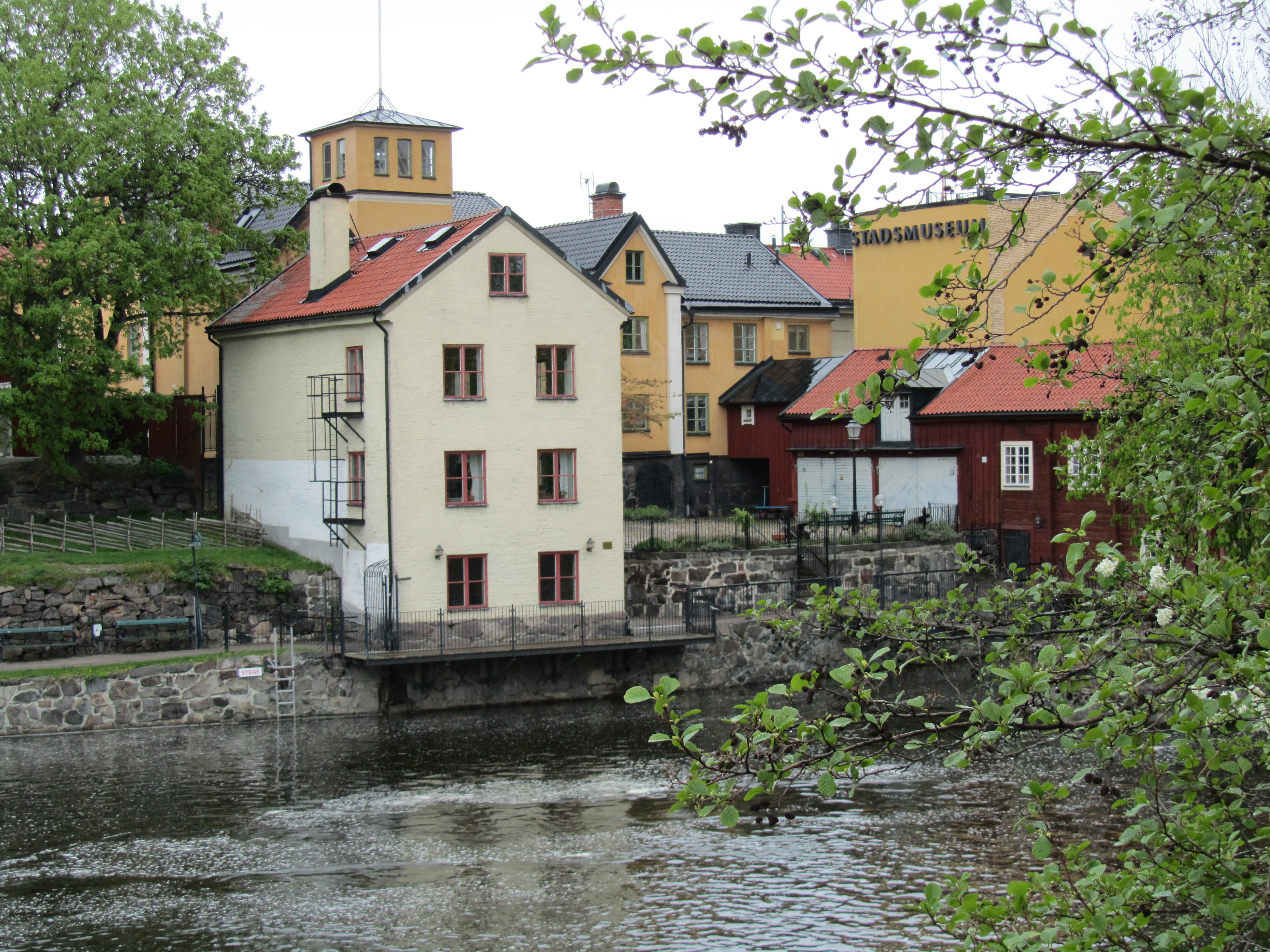 Grå huset in Norrköping